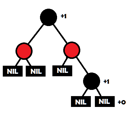 Altura preta de uma árvore (à partir da raiz) utilizando o método de contar a raiz e não contar os nós NIL